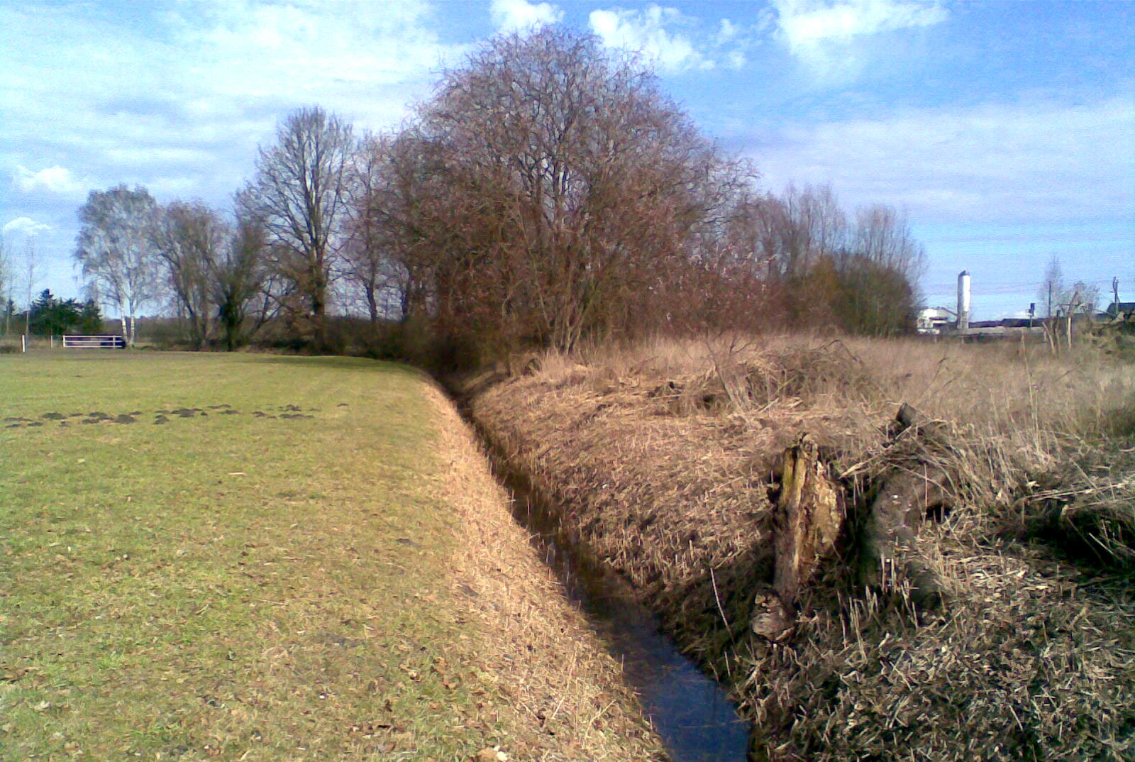 Die Panke 400 Meter unterhalb ihrer Quelle in Bernau, Pankeborn.